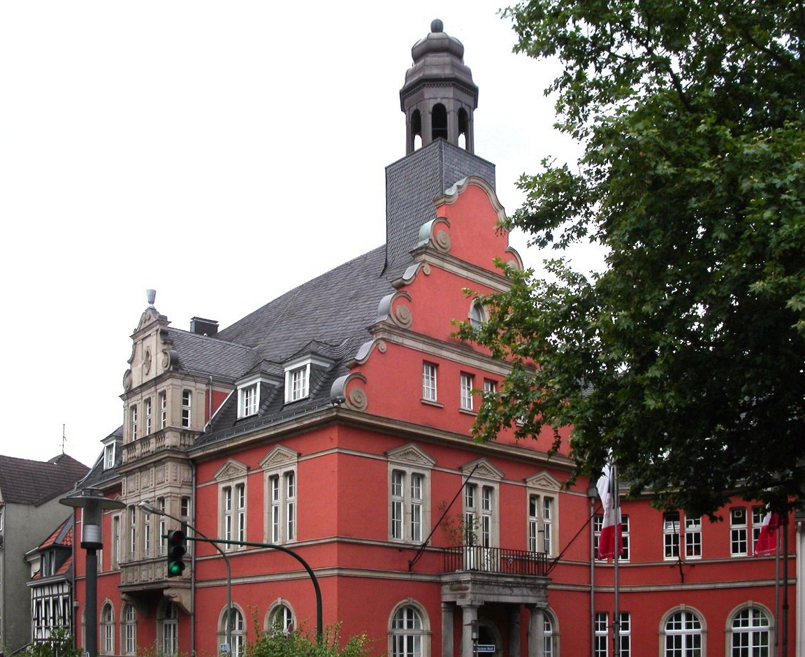 Historisches Rathaus in Essen-Werden